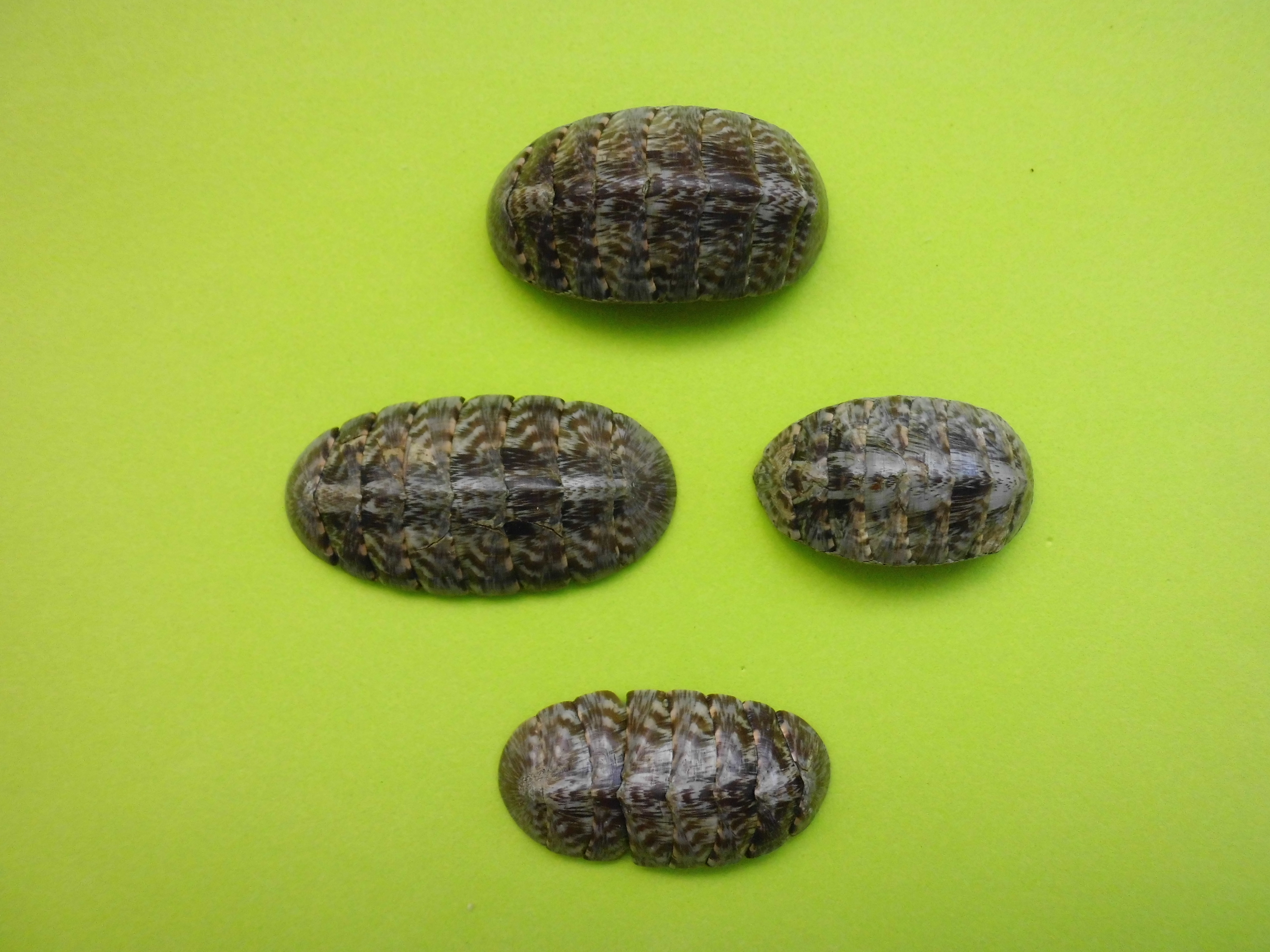 Chiton (Chiton) marmoratus colectado en 2002 en el Archipiélago Los Monjes, Dependencias Federales - Venezuela